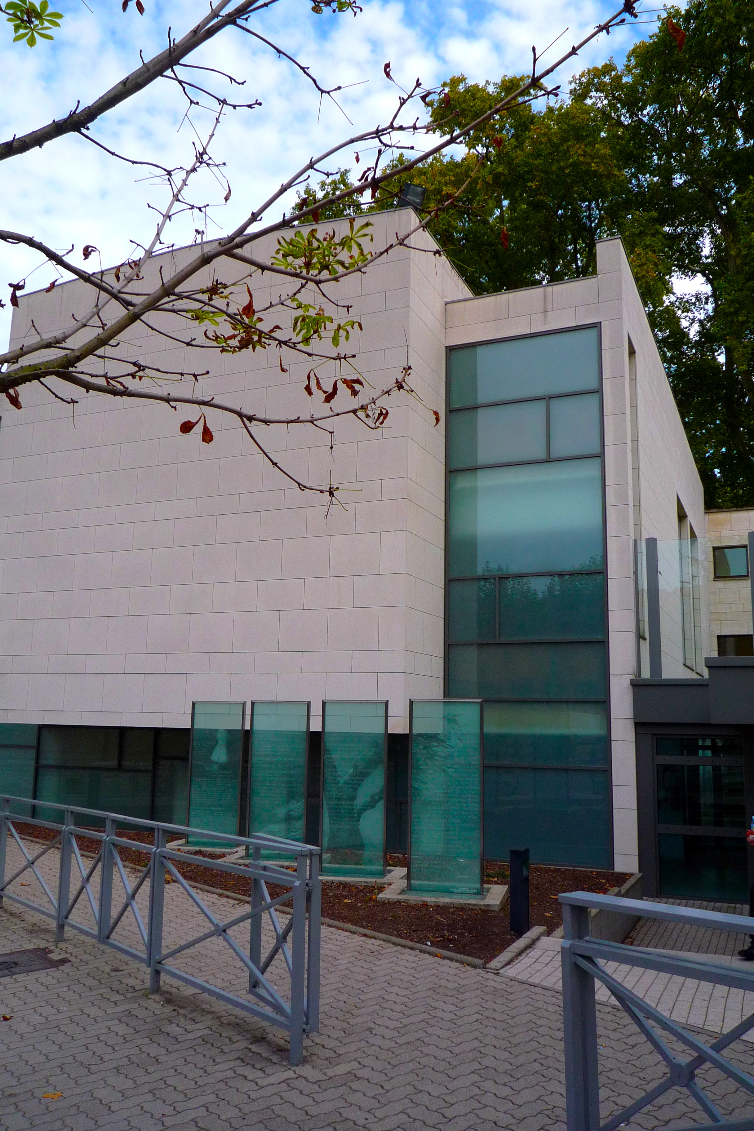 Strasbourg grande synagogue de la Paix, centre comunautaire. 2011